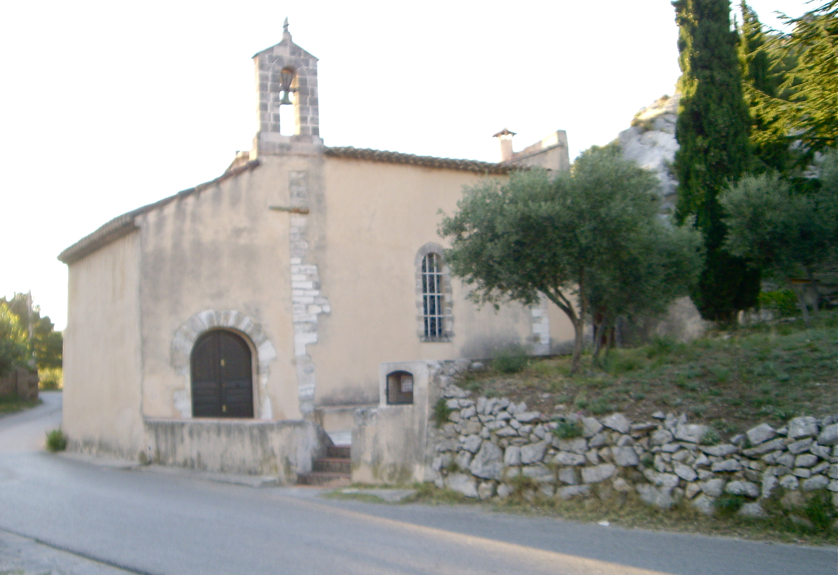 Chapelle Notre Dame de la Galline